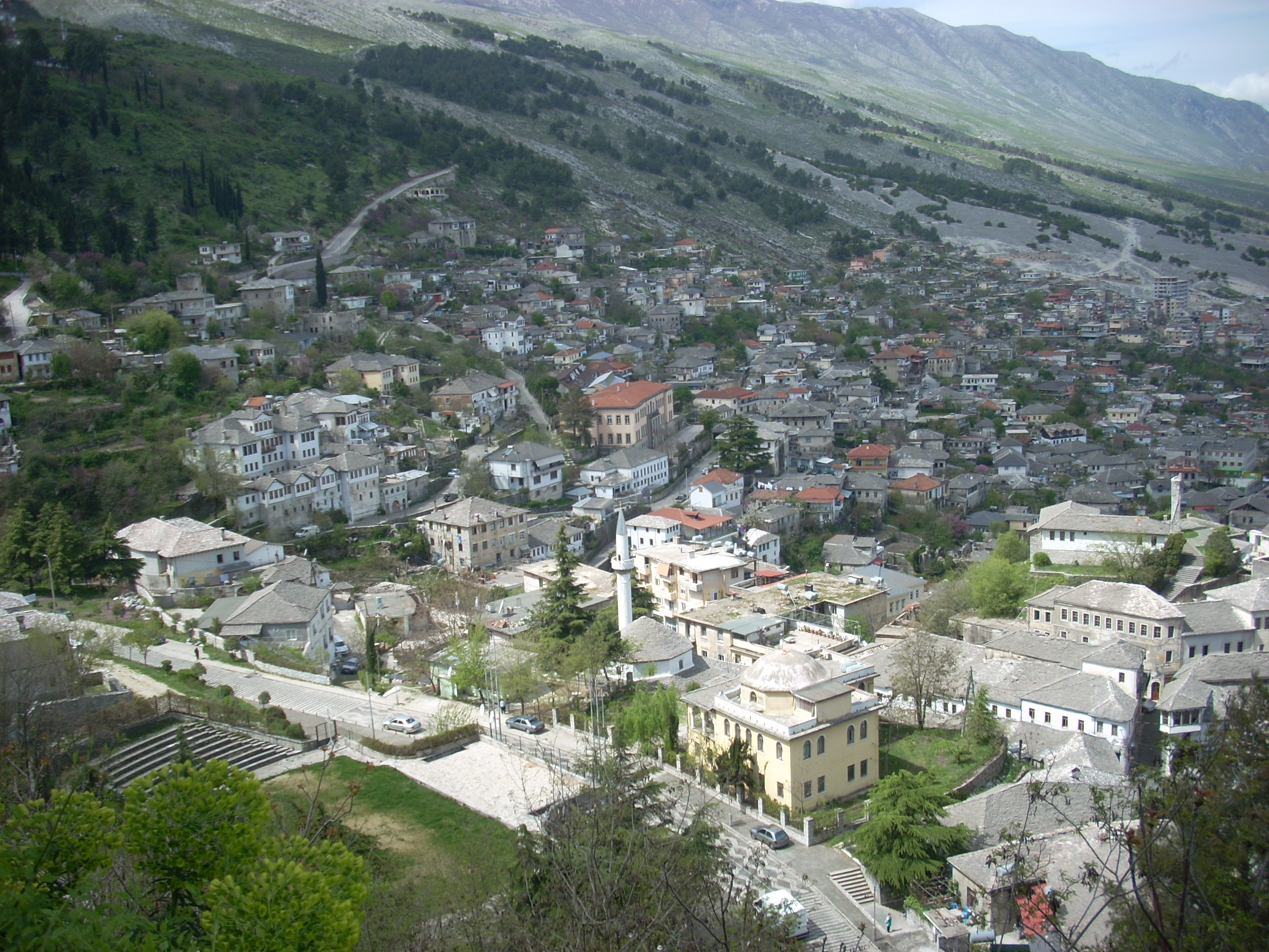 Άποψη της πόλης του Αργυρόκαστρου από το Κάστρο